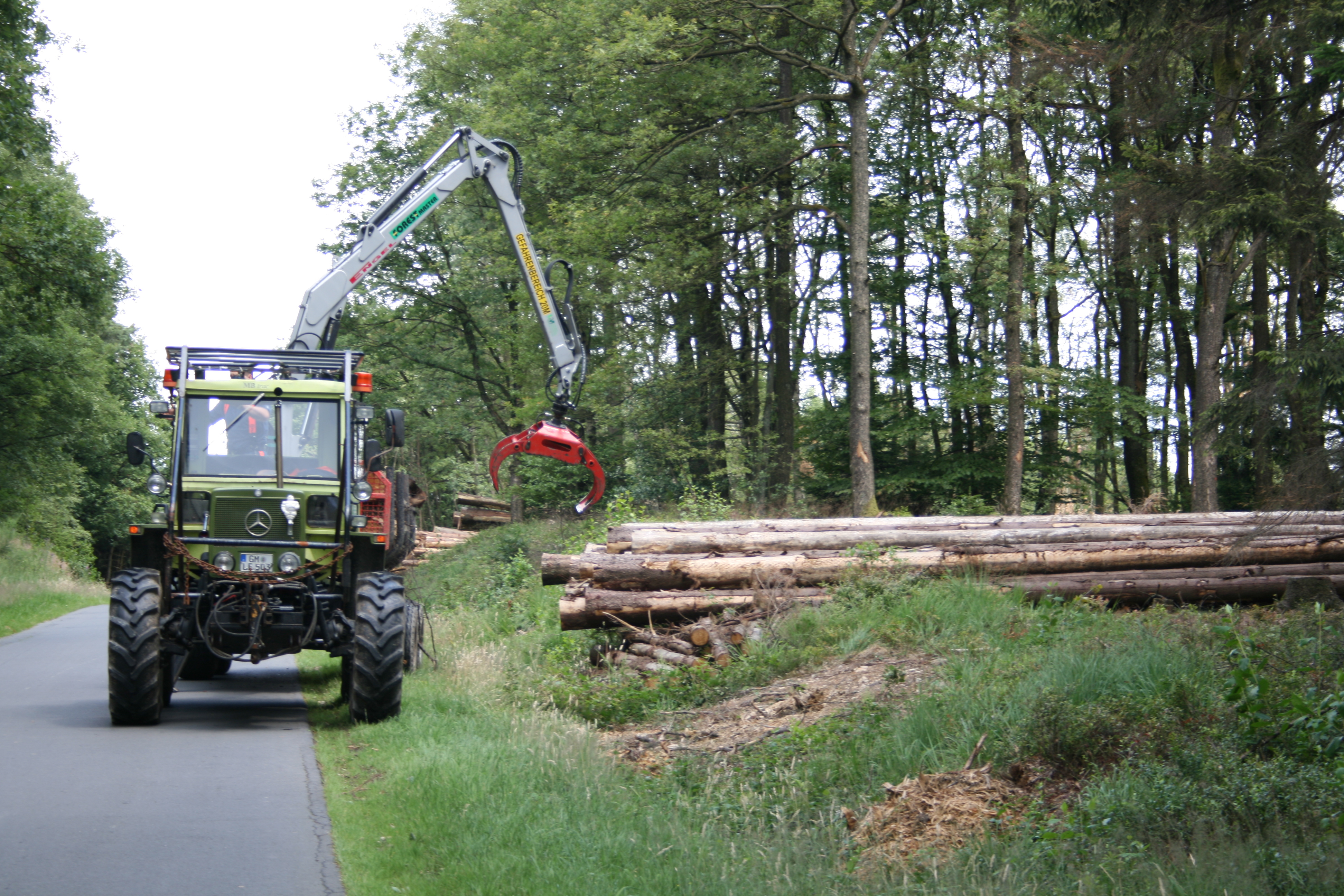 Forstwirtschaftliche Nutzung auf dem Nutscheid, NRW, Deutschland – MB trac mit Forstausrüstung, Rückewagen und Forstkran mit Verladezange (Forest Master von Engel-Forsttechnik) beim Verladen von Rundholz